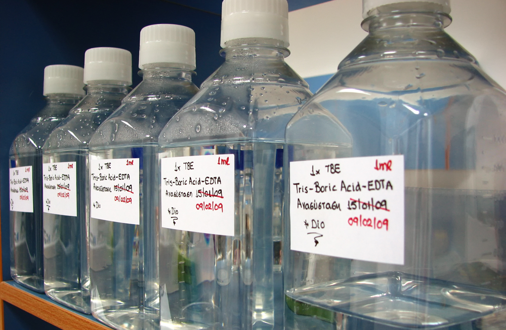 Банки TBE-буферу